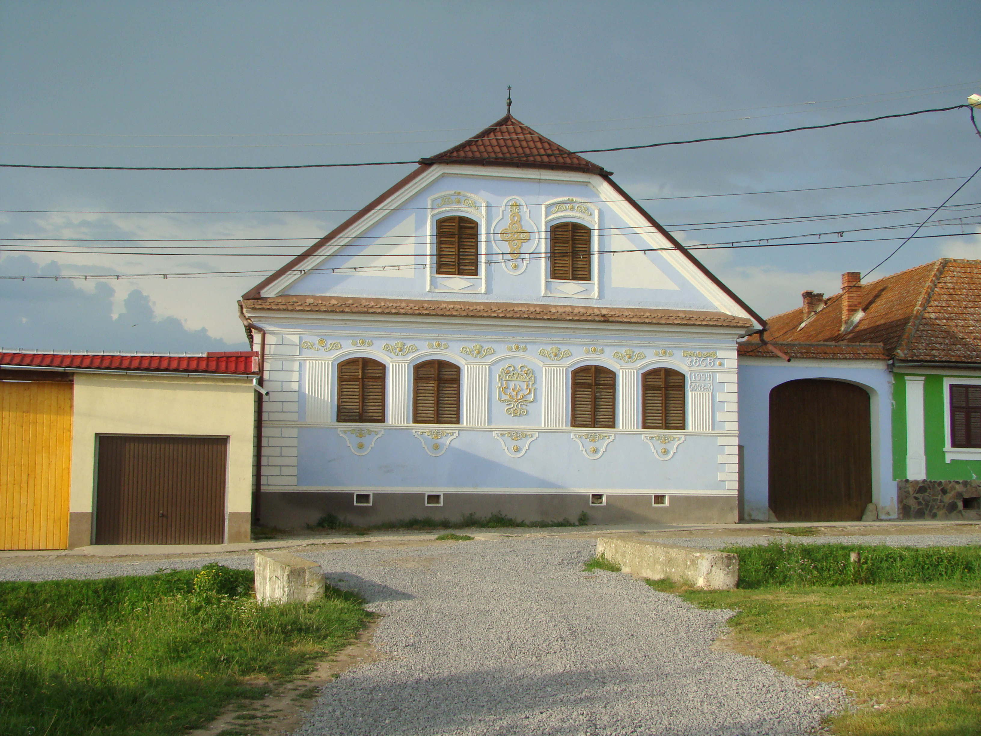 Ansamblul rural „Piața Centrală”, sat Cața; comuna Cața Construcțiile de pe cele patru laturi ale pieței, sec. XIII-XIX